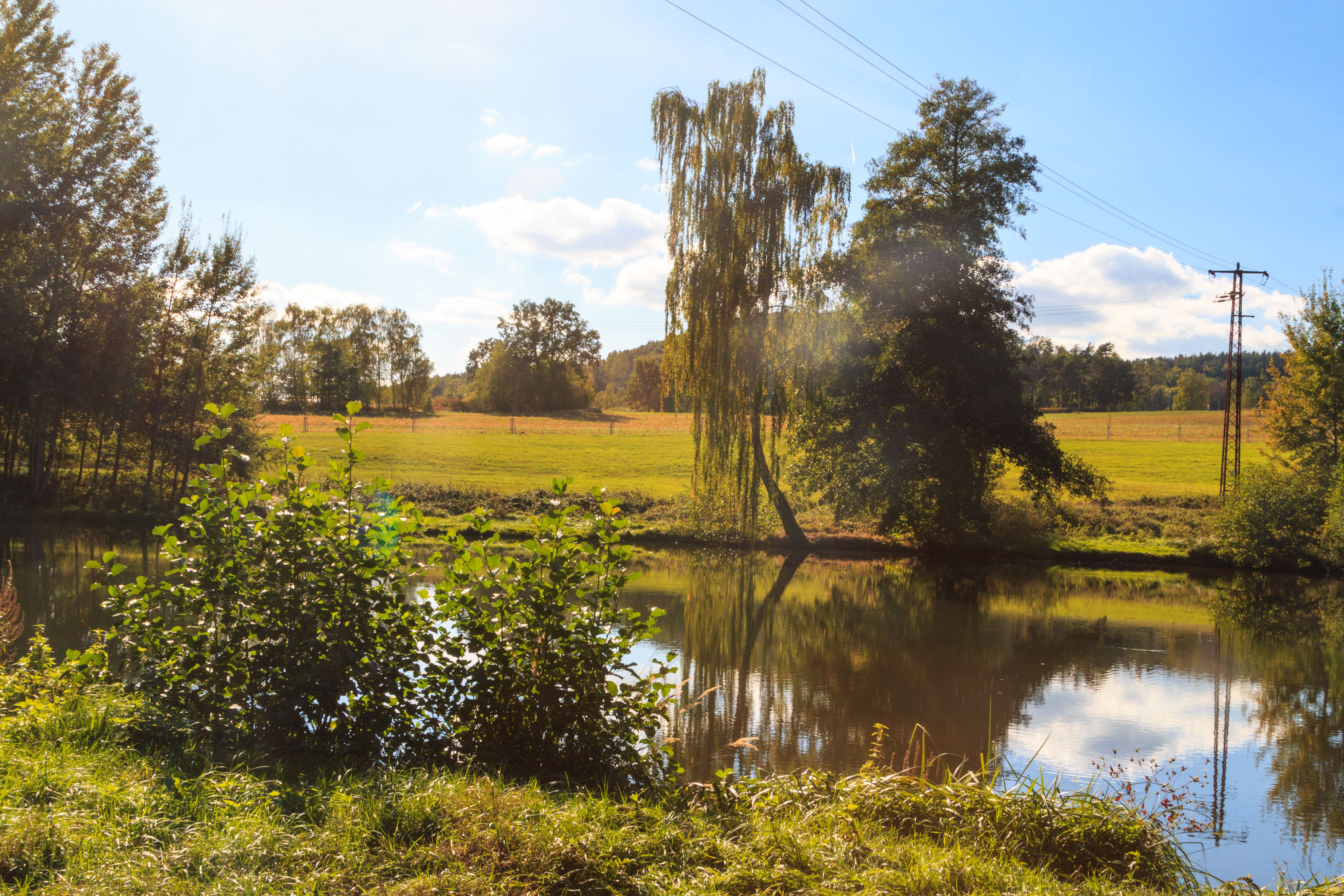 Dolní Chotovický rybník Project: Vodstvo.